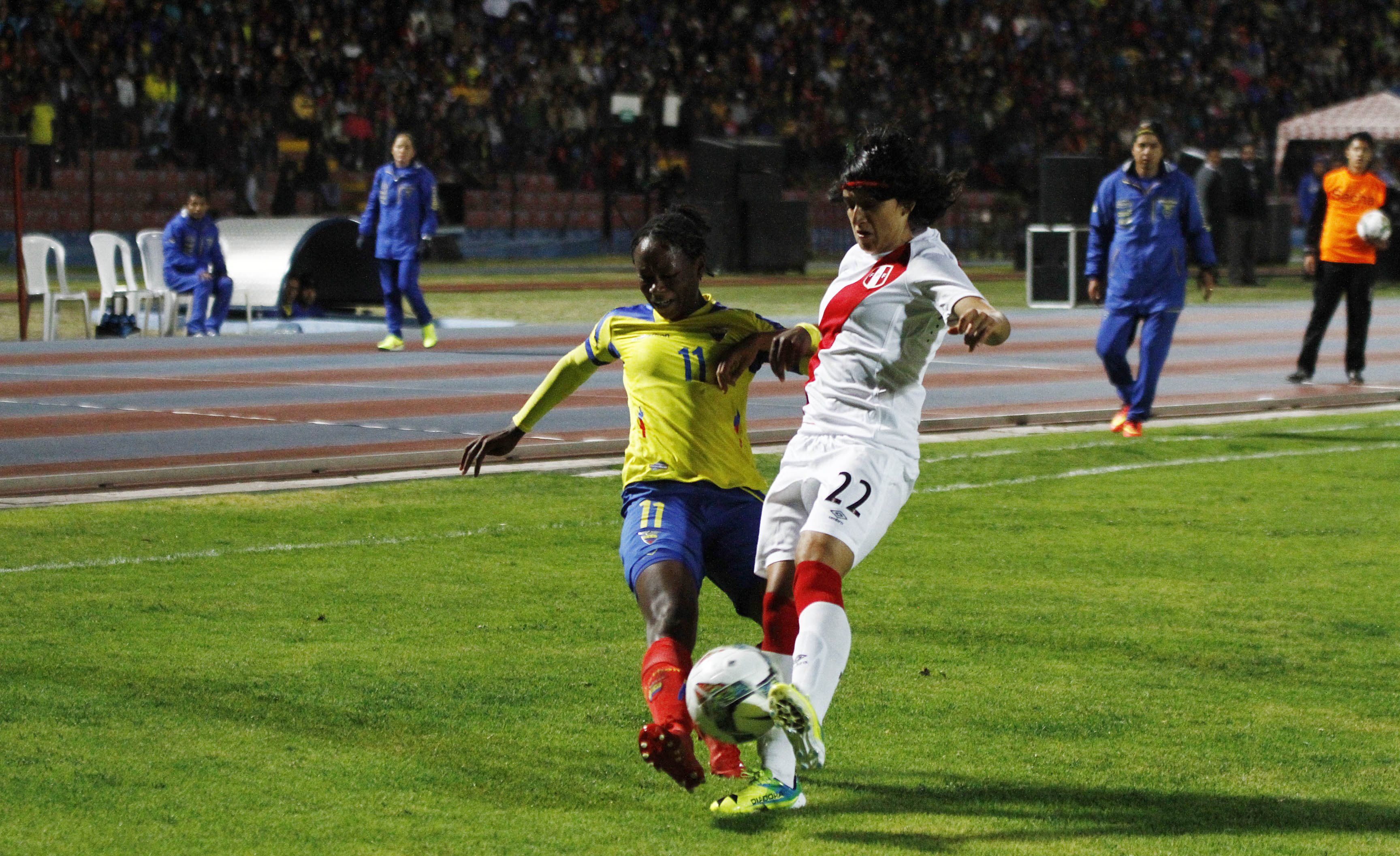 Riobamba (Chimborazo), 11 sep (Andes).- La selección ecuatorianan de Fútbol consigue su primera victoria 1-0 ante su similar de Perú en la Copa América Femenina de Fútbol "Ecuador 2014", partido que se disputo en el estadio Olímpico de Riobamba . Foto: Micaela Ayala V./Andes